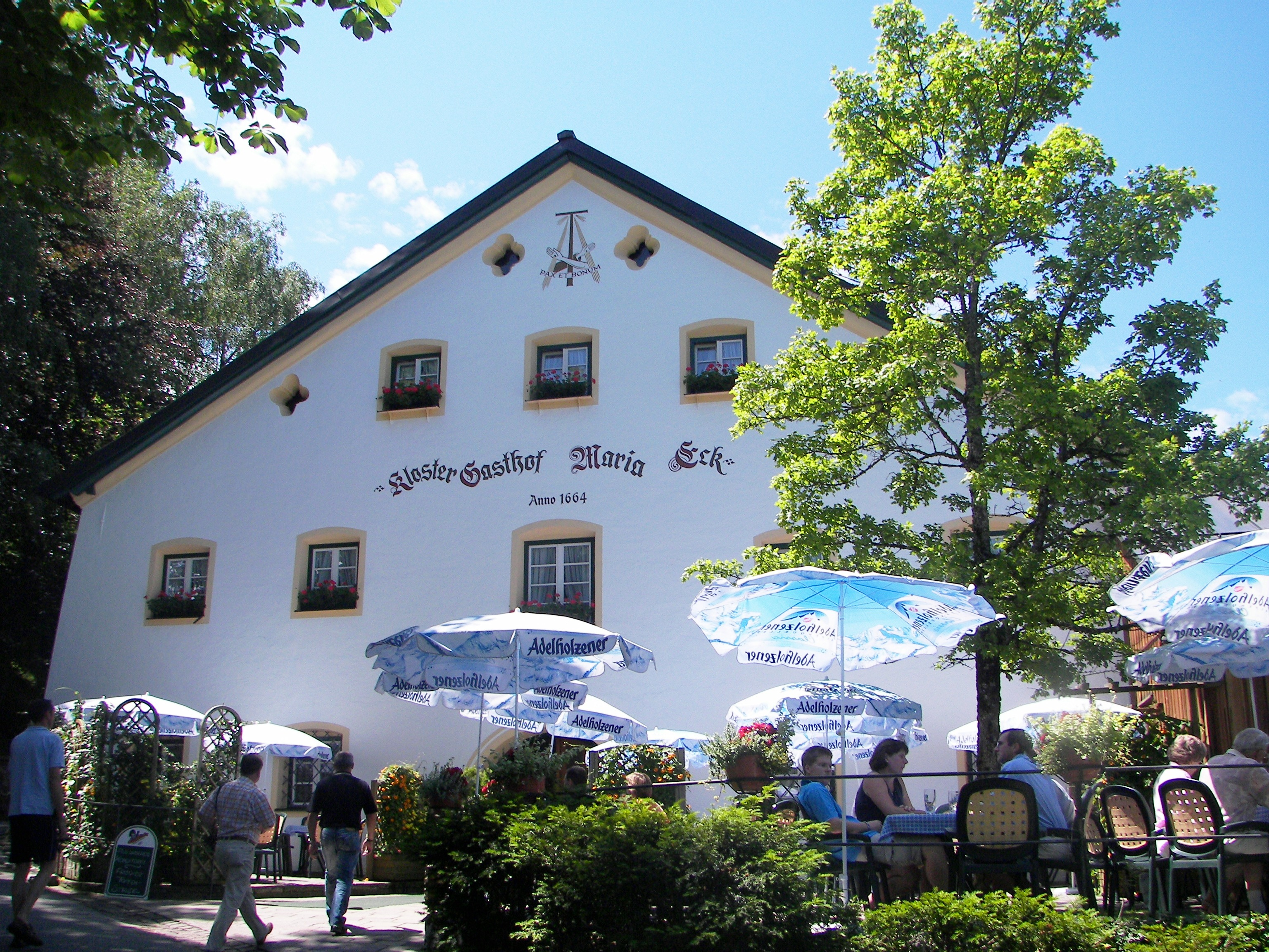 Außenansicht des Klostergasthofs in Maria Eck